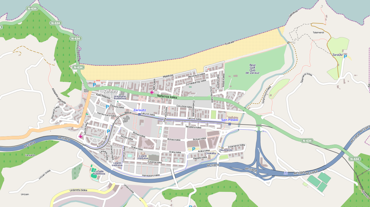 Zarauzko kokapen mapa. Gipuzkoa, Euskal Herria. Location map of Zarautz. Gipuzkoa, Basque Country.